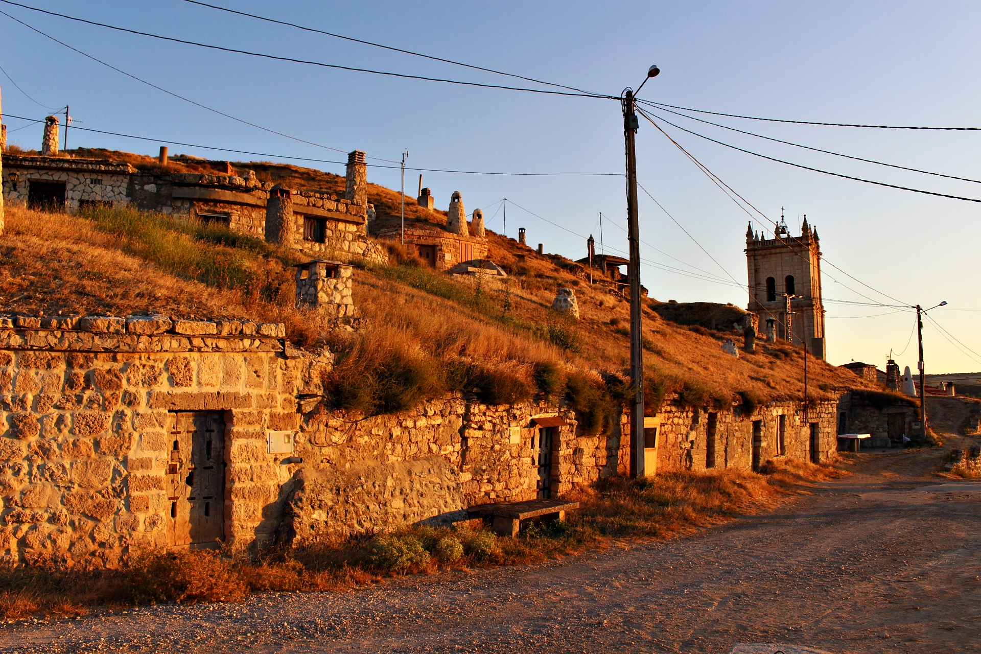 Bodegas de Baltanás 2